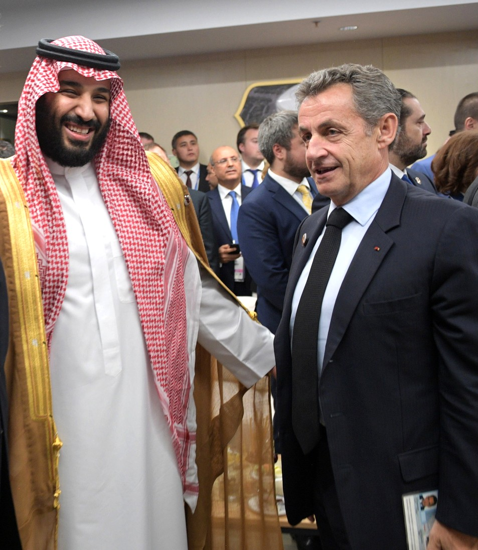 В перерыве матча Президент России Владимир Путин кратко пообщался с иностранными гостями, прибывшими на Чемпионат мира по футболу 2018 года